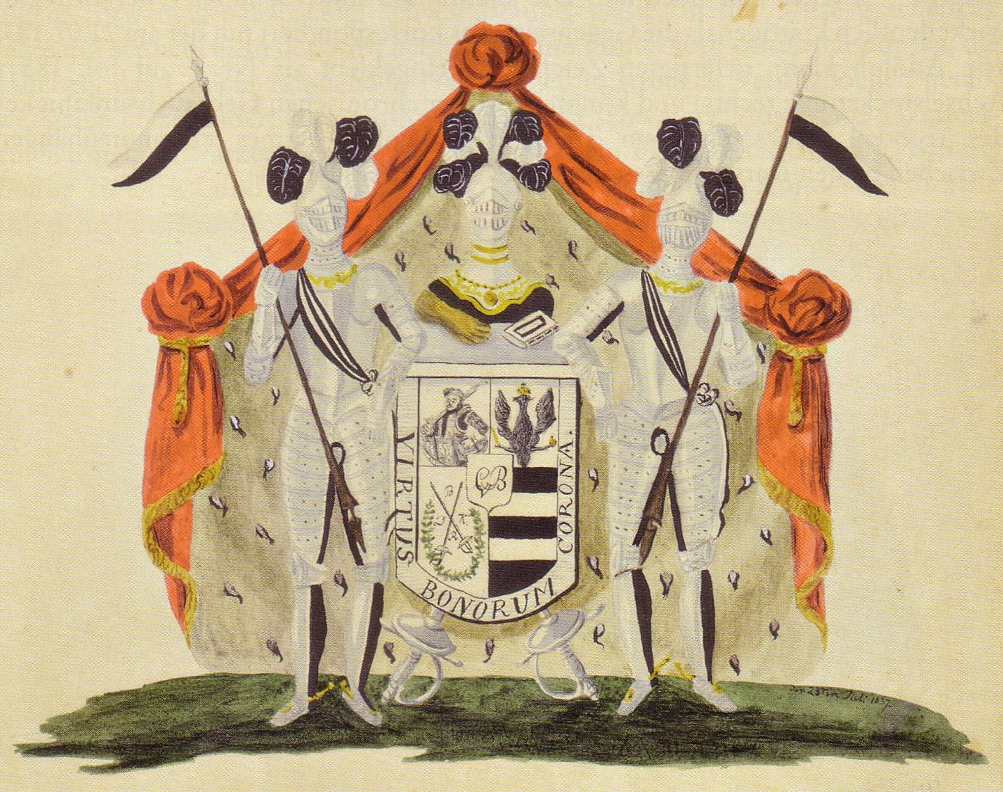 Wappen der Corpslandsmannschaft Borussia Königsberg